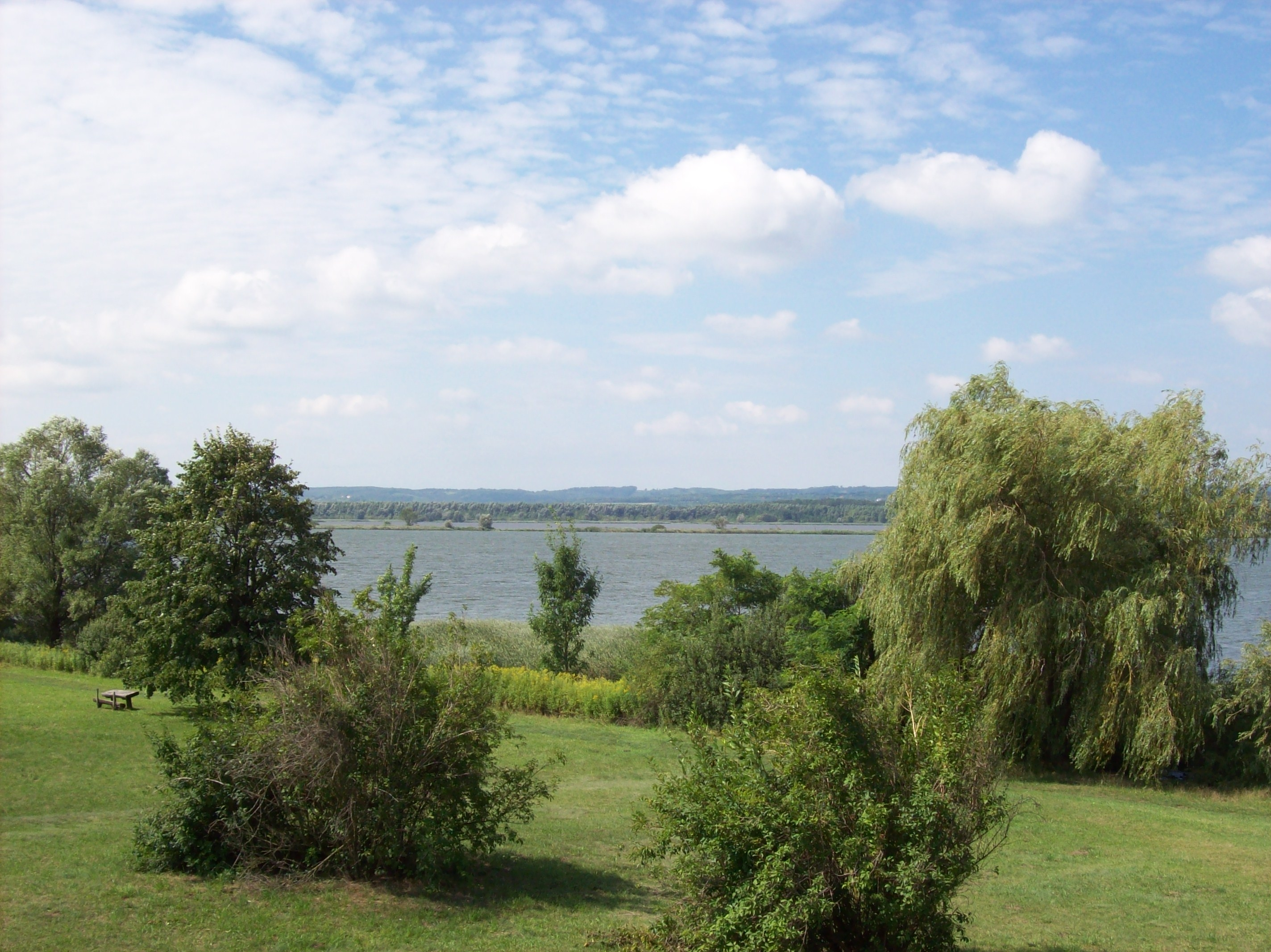 Kis-Balaton from the Kányavári sziget island